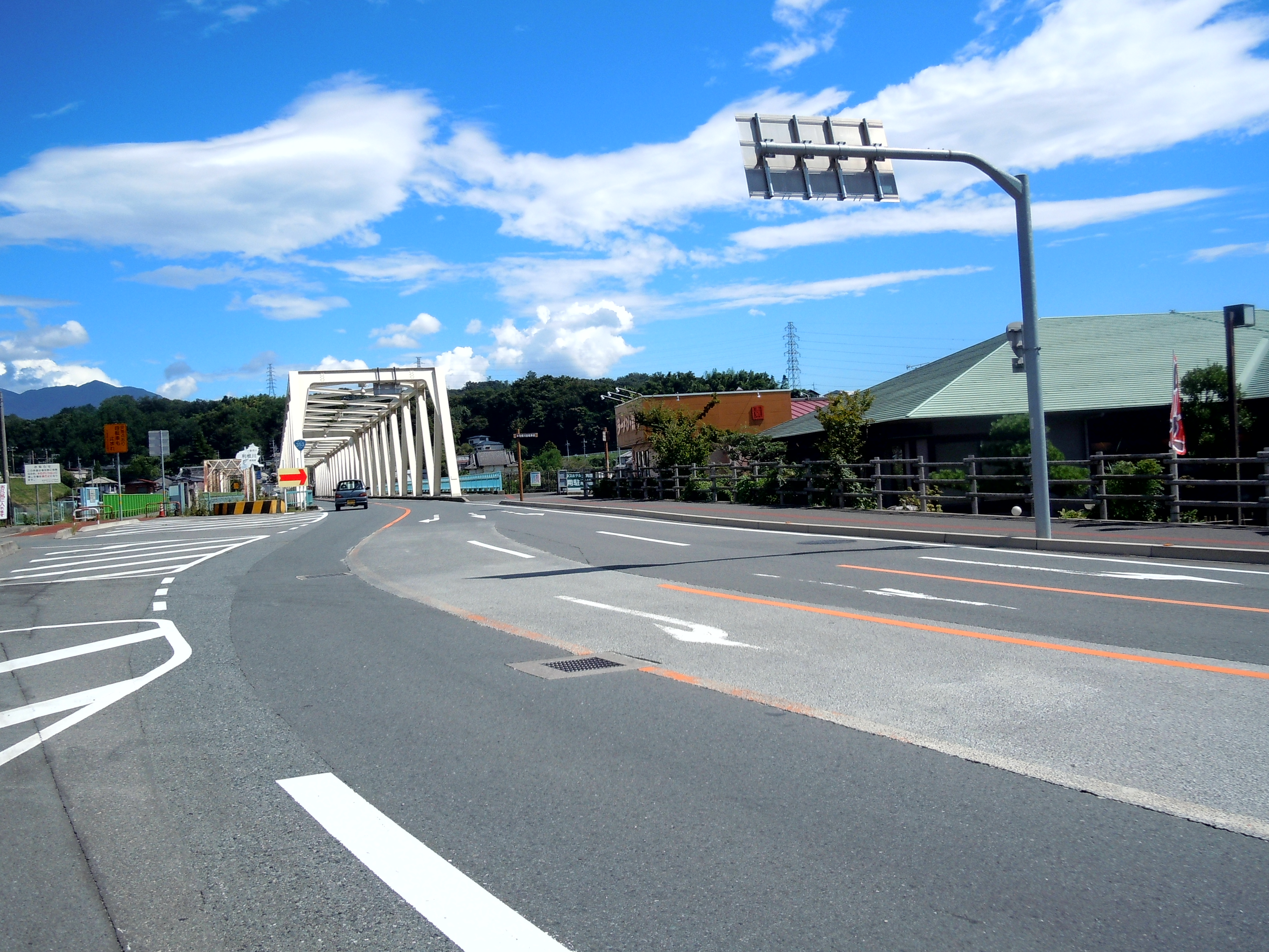 国道353号線 群馬県渋川市・大正橋付近